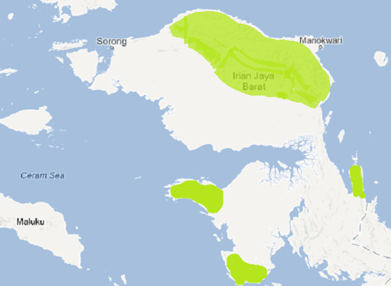 Auf den Bild ist das Verbreitungsgebiet des Hüttengärtners auf der Vogelkop Halbinsel